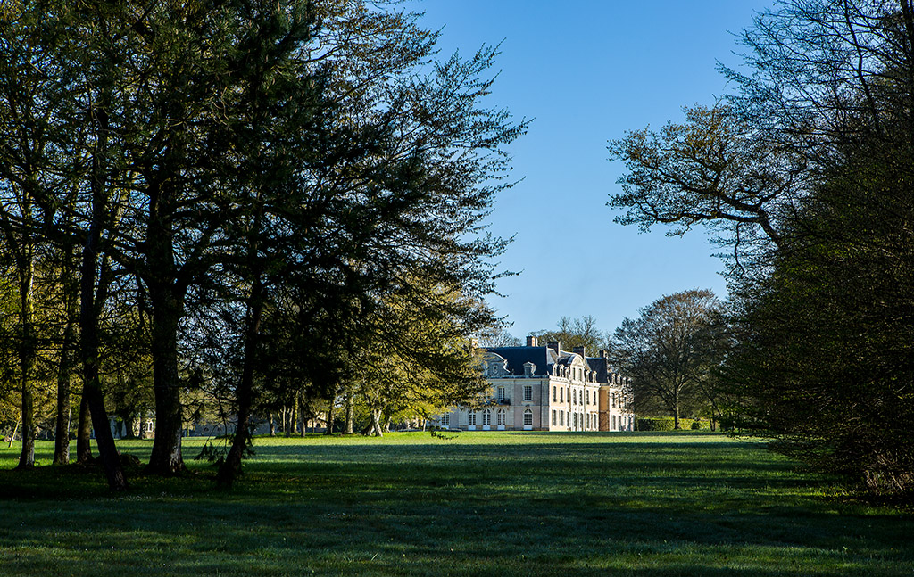 vue du Château